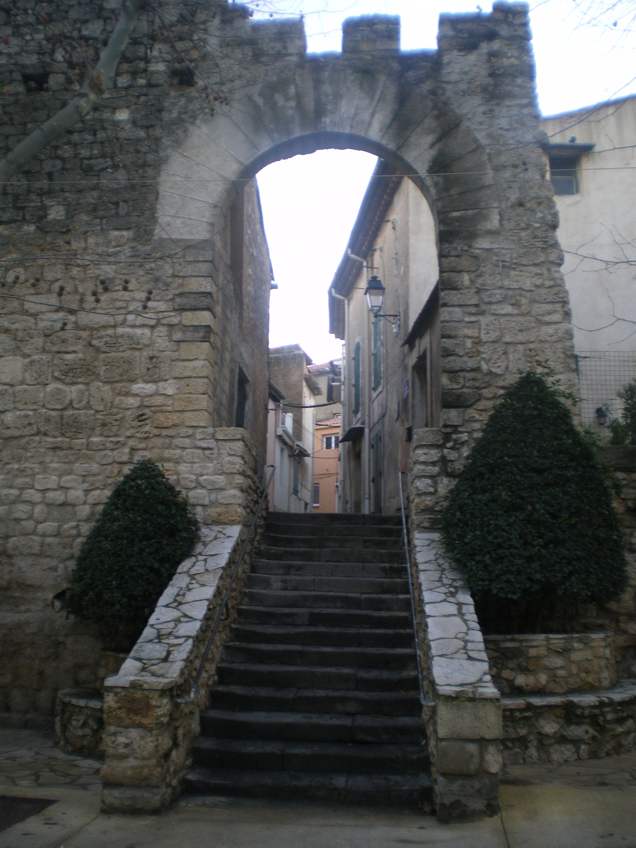 Porte de l'ancien pont levis, Puisserguier (Hérault)